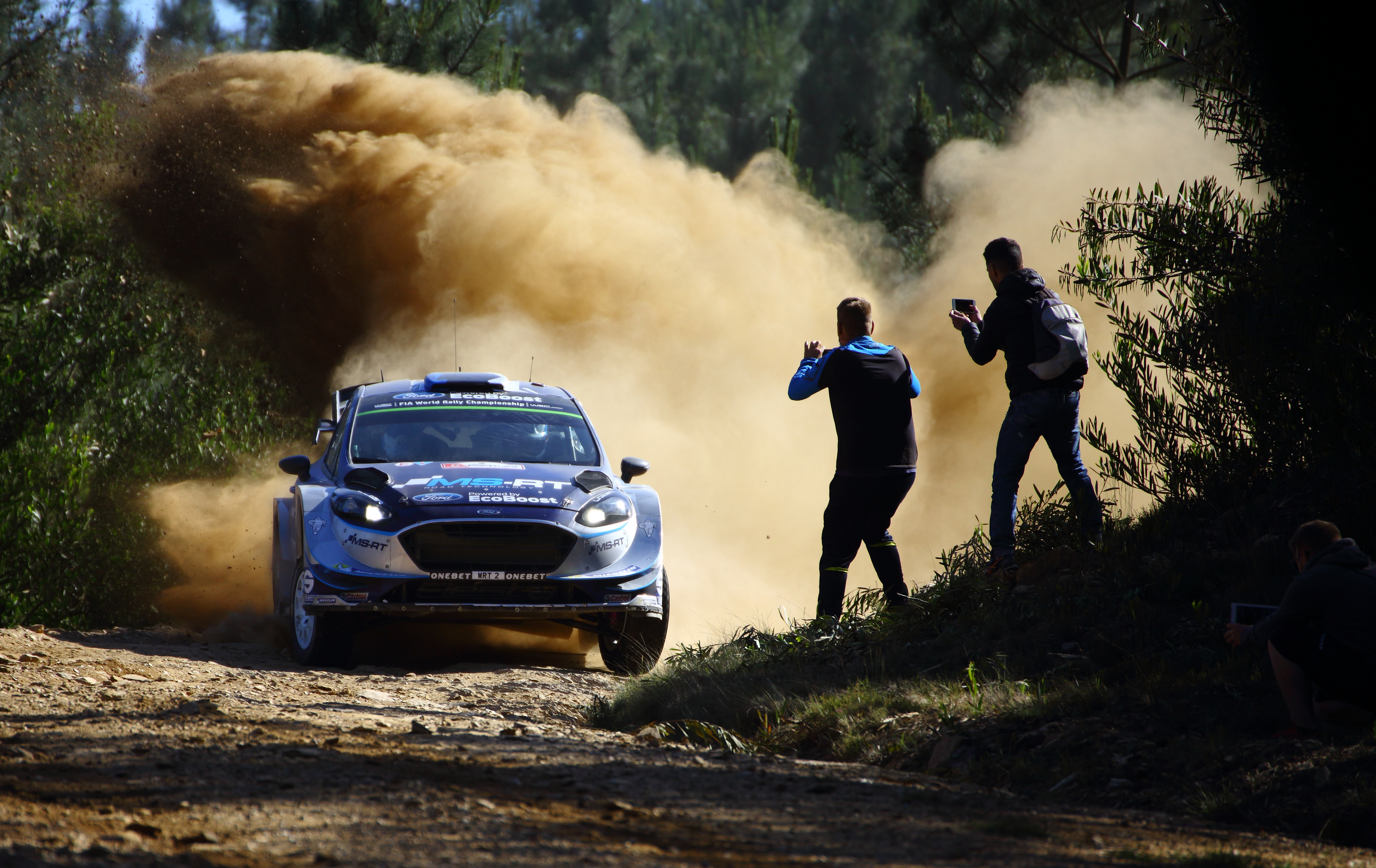 2017 Rally Portugal